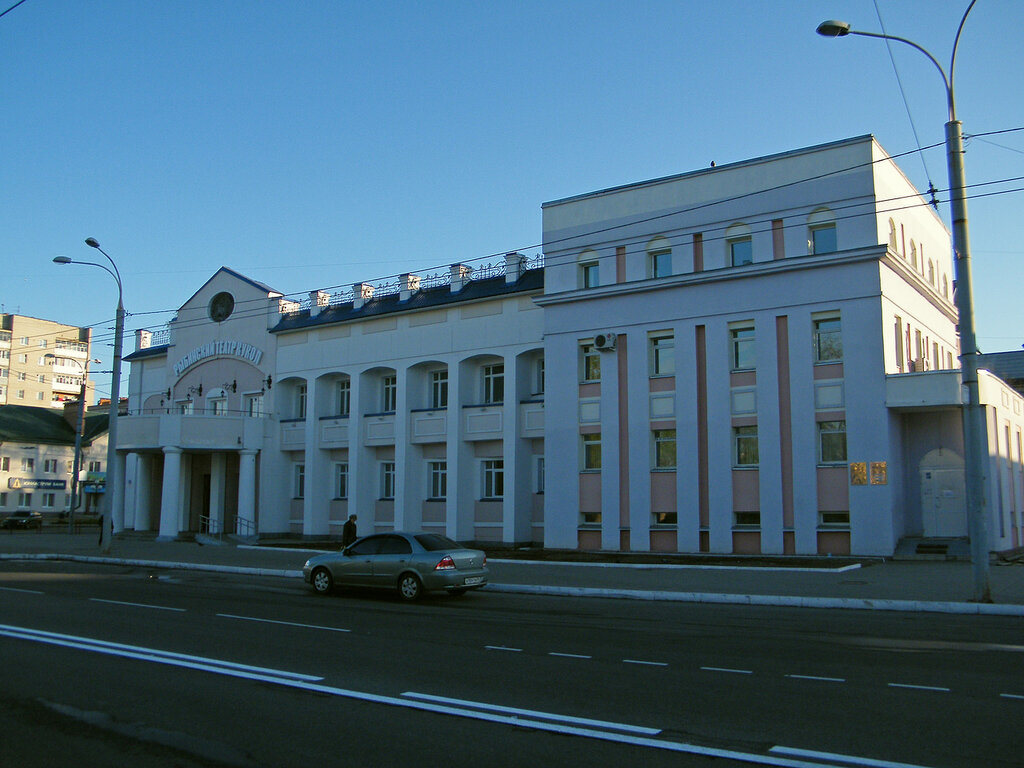 Рыбинский театр кукол